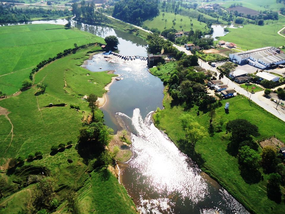 Represa, Rio Braço do Norte